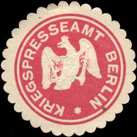 Sealing stamp Title: Kriegspresseamt Berlin Description: geprägt, rot, weiß Place: Berlin size: 4 cm